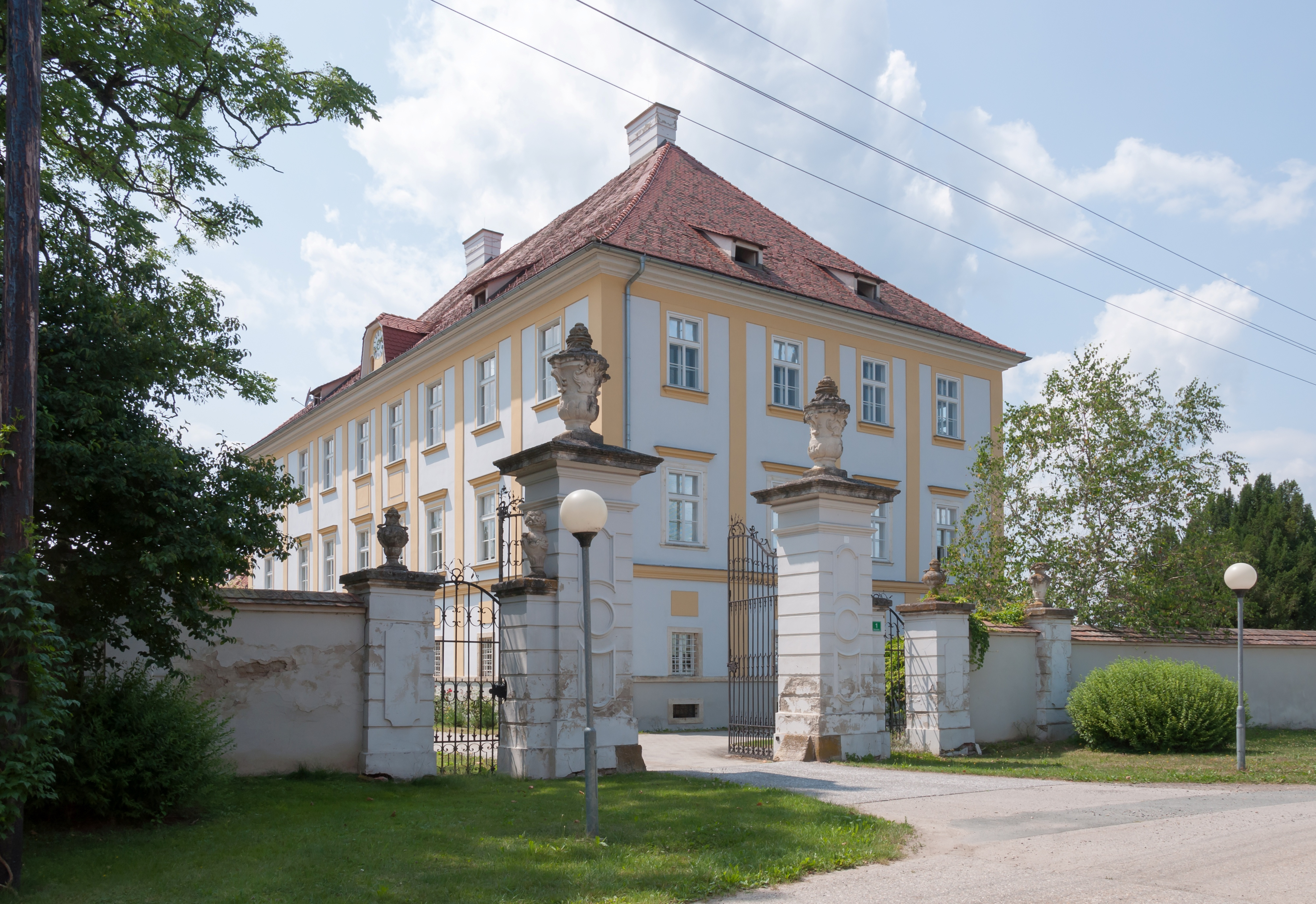 Sog. Neuschloss